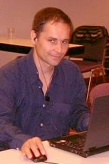 Harry Schaack, Herausgeber und Chefredakteur der Schachzeitschrift KARL, 2009 im Pressezentrum der Chess Classic in Mainz.